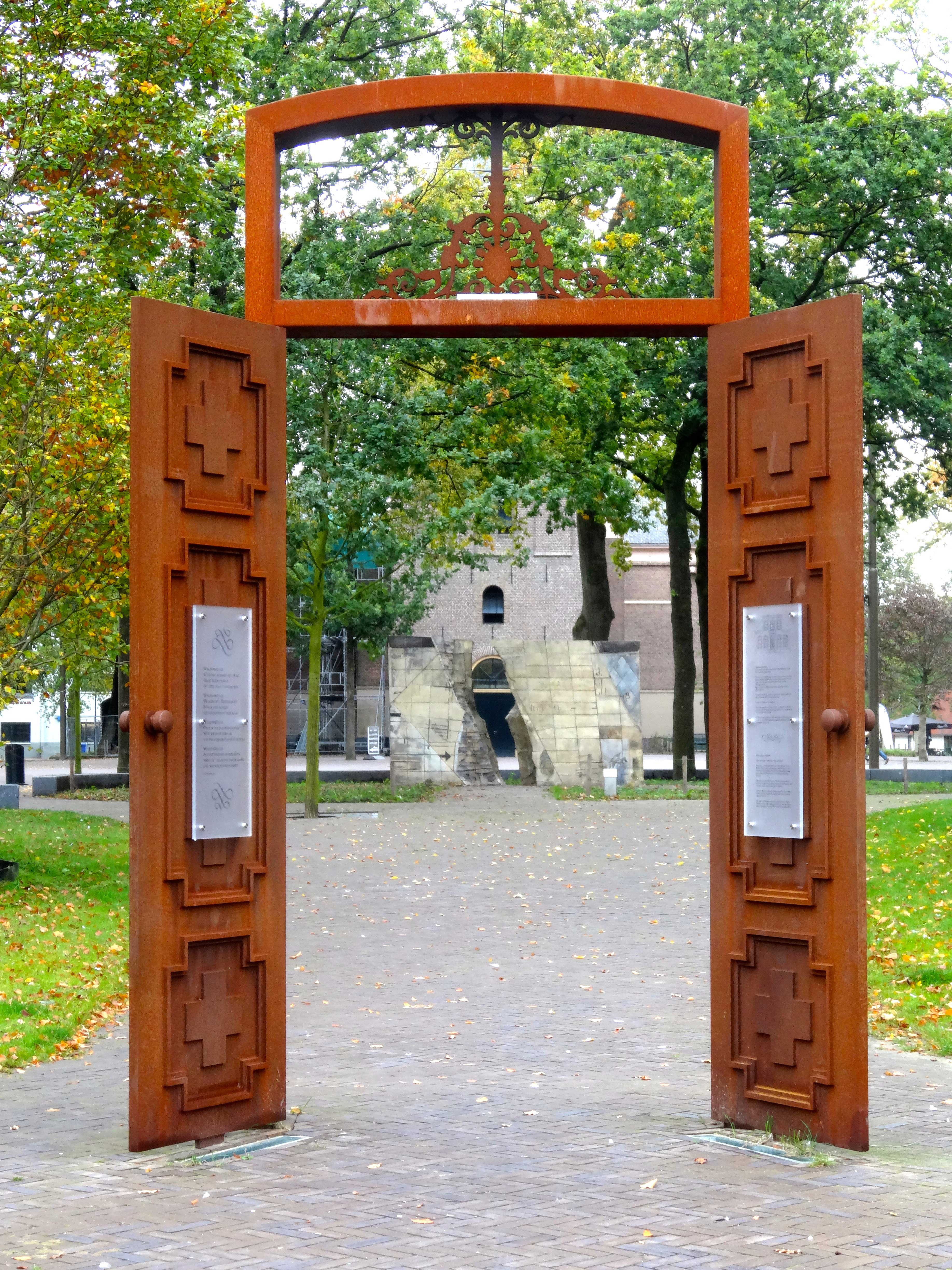 "Markant Punt", replica (vergroot) van de toegangsdeur van het oude raadhuis van Emmen - Markt Emmen